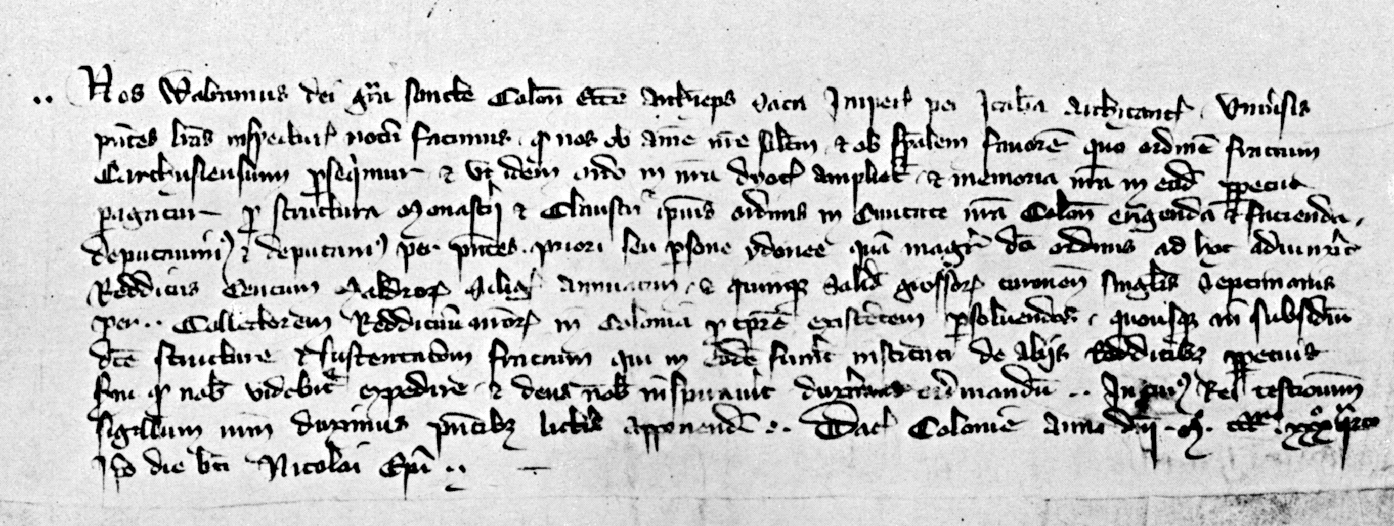 Stiftungsurkunde der Kölner Kartause, Pergament, hier ohne Siegel abgebildet